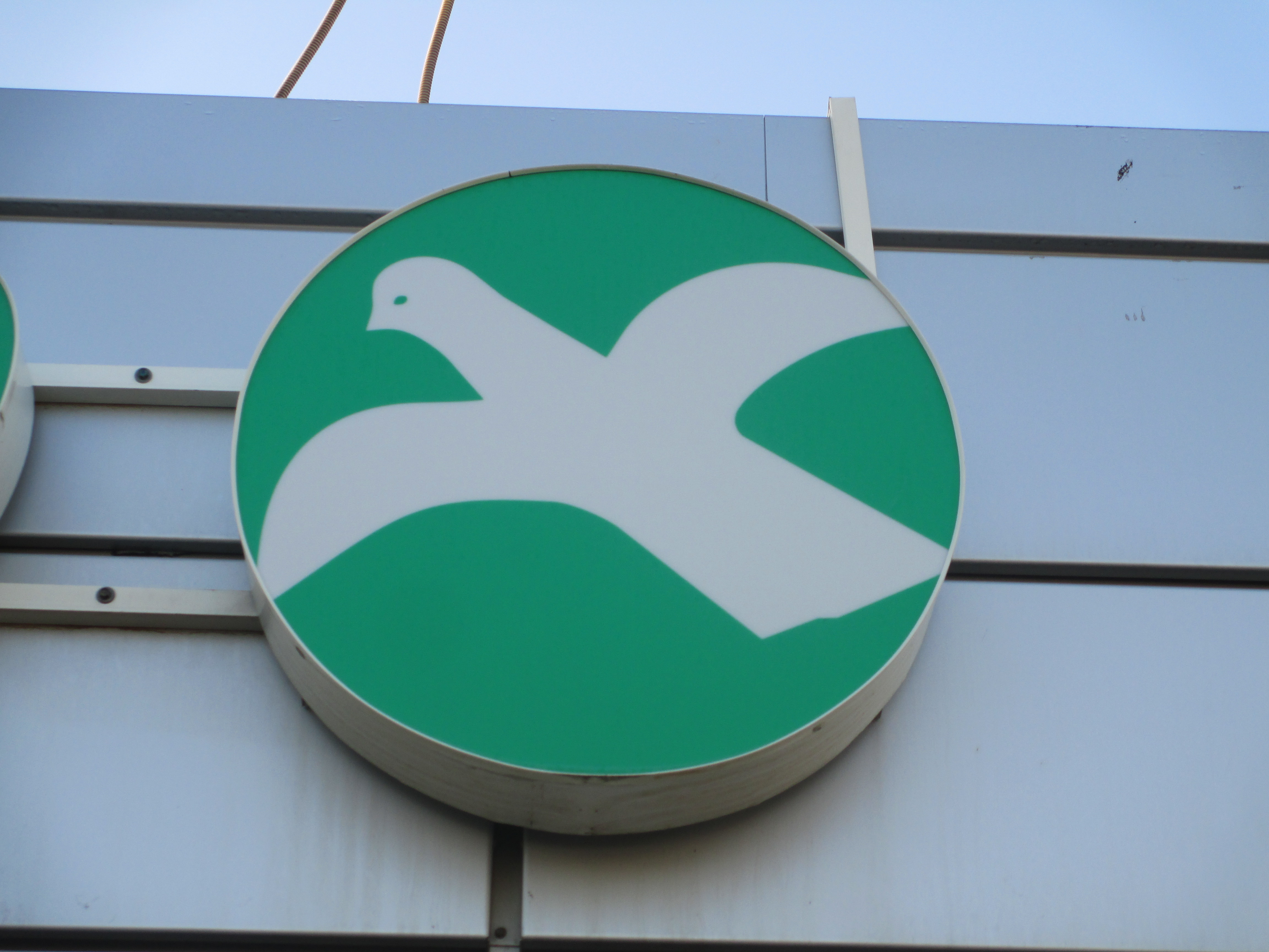 הסמליל של המרכז לבריאות הנפש גהה בפתח תקווה